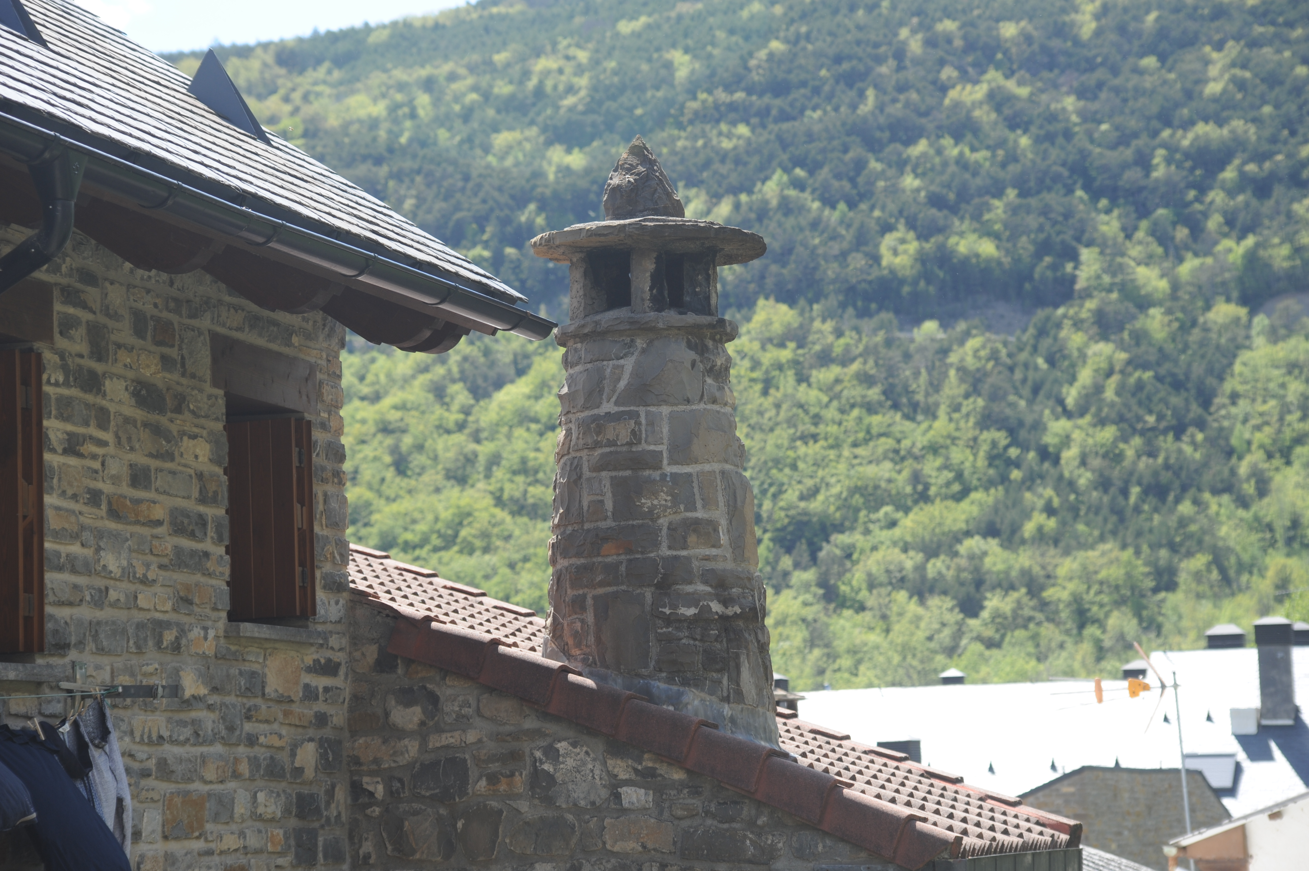 Fotografía de las chimeneas típicas del Pirineo, Biescas